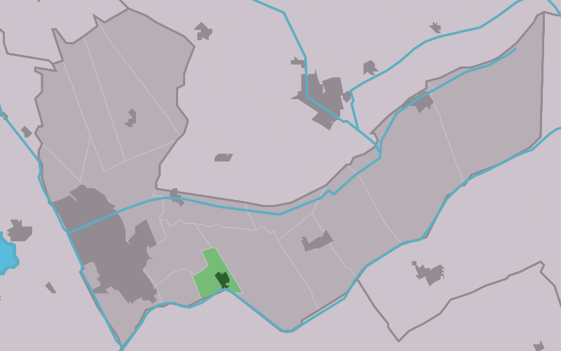 Kaartsje fan himrik fan Mildaam